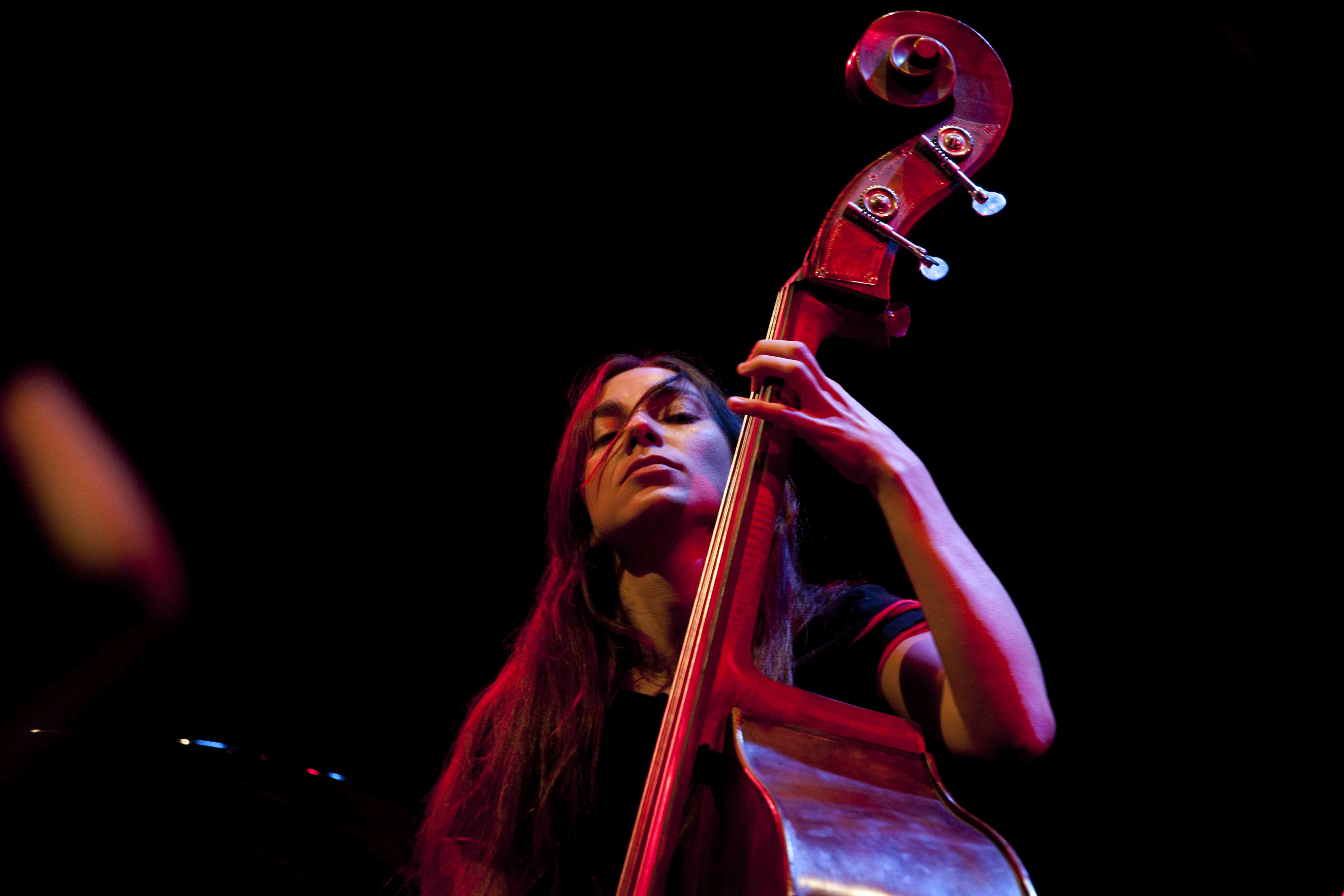 Contrabbassista Caterina Palazzi in concerto